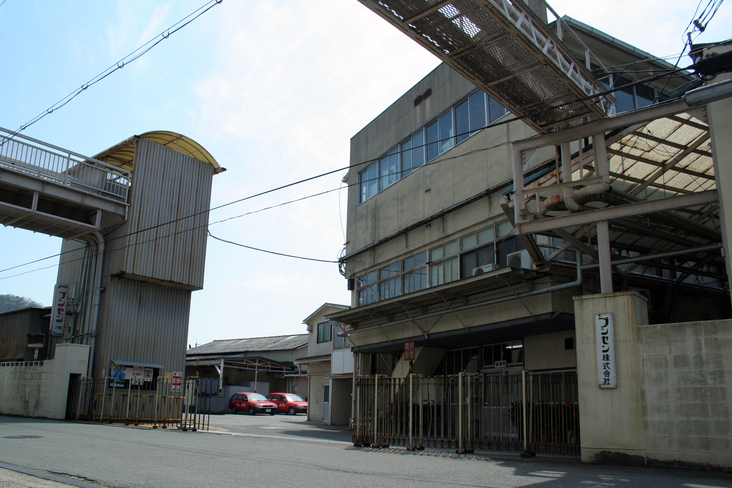 兵庫県南西部にある様々な建物。 JR姫新線播磨新宮駅近くにあるブンセン本社兼工場。